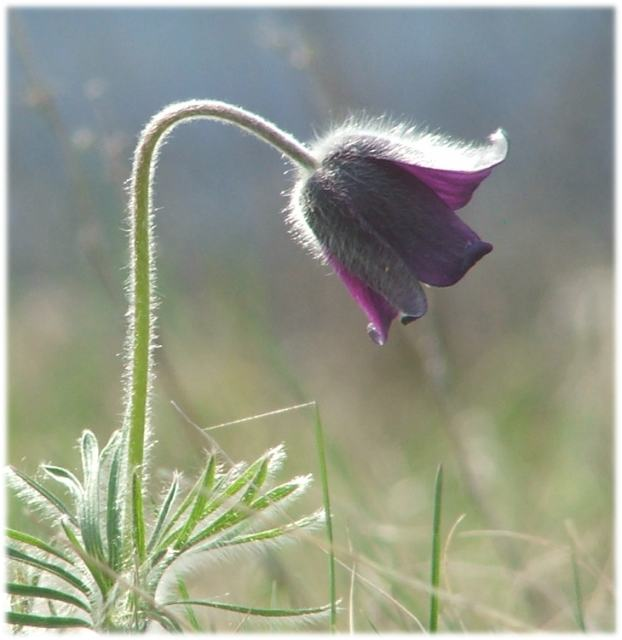 Mezei kökörcsin (Pulsatilla pratensis)